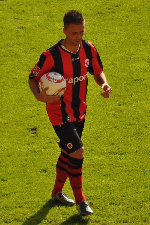 Benjamin Köhler gegen Borussia MG